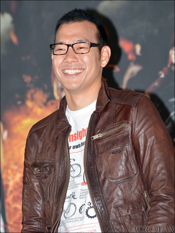 CJ E&M XTM 탑기어 코리아 시즌 2 제작 발표회에 참가한 김진표